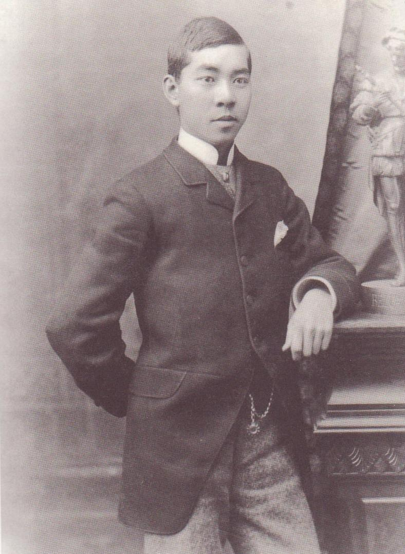 中文（香港）: 1881年周壽臣於菲立斯學院畢業時攝 Bân-lâm-gú: 1881-nî Tsiu Siū-sîn tī Phillips ha̍k-īnn pit-gia̍p ê sî-tsūn sóo hip. 1881年周壽臣佇菲利普斯學院(Phillips Academy)畢業的時陣所翕。